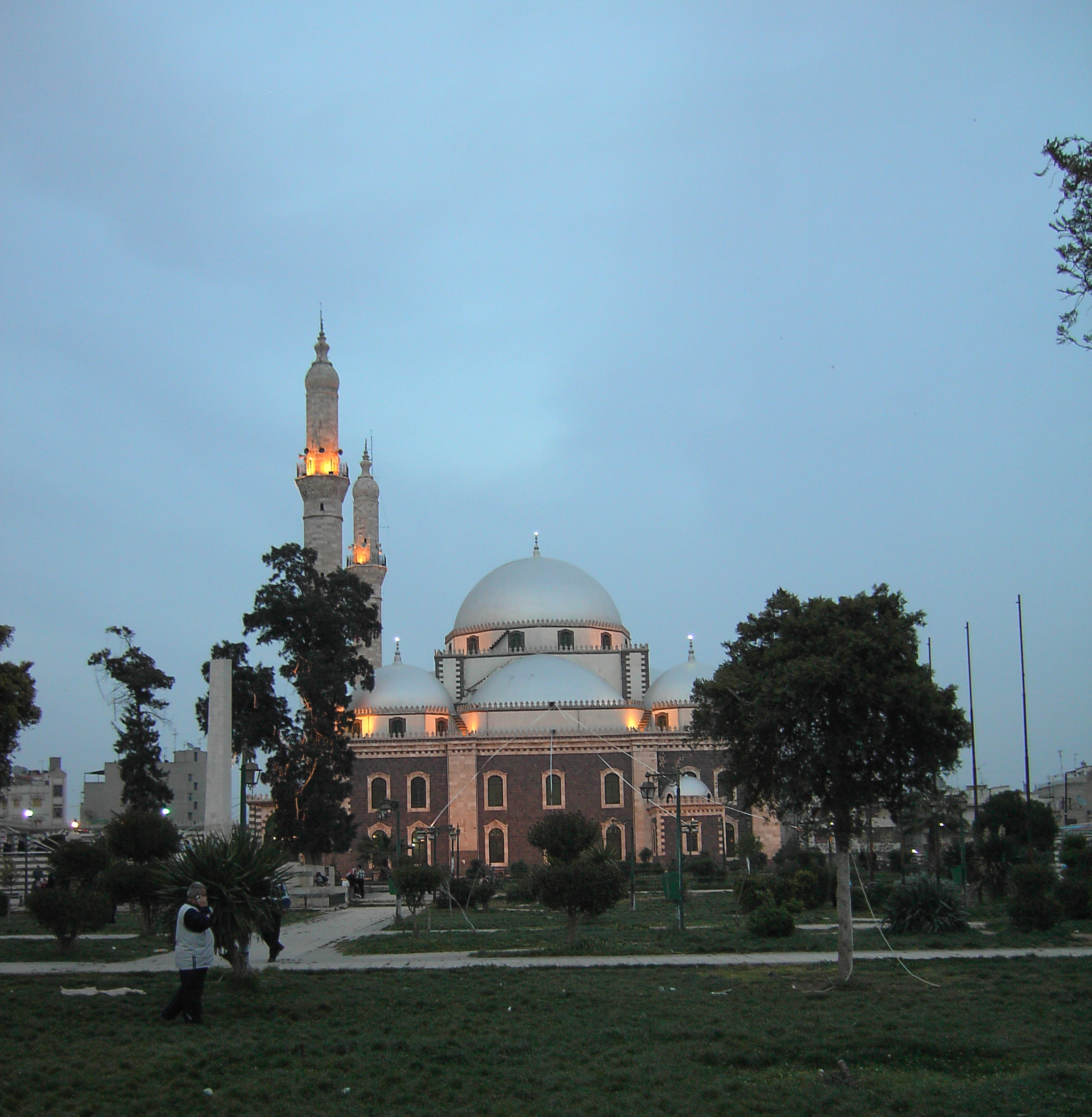 Moschea di Khalid b. al-Walid a Homs